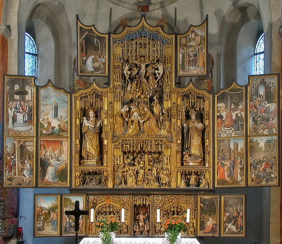 Vermutlich entstanden um 1525 in Flandern, wird dem Werk der Lukasgilde aus Antwerpen zugeschrieben.